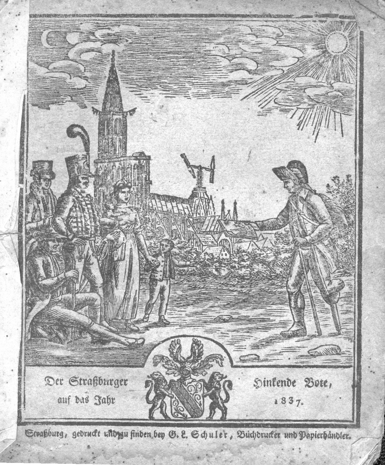 Le Messager boiteux de Strasbourg (1837). On voit à l'arrière-plan la cathédrale avec le télégraphe Chappe